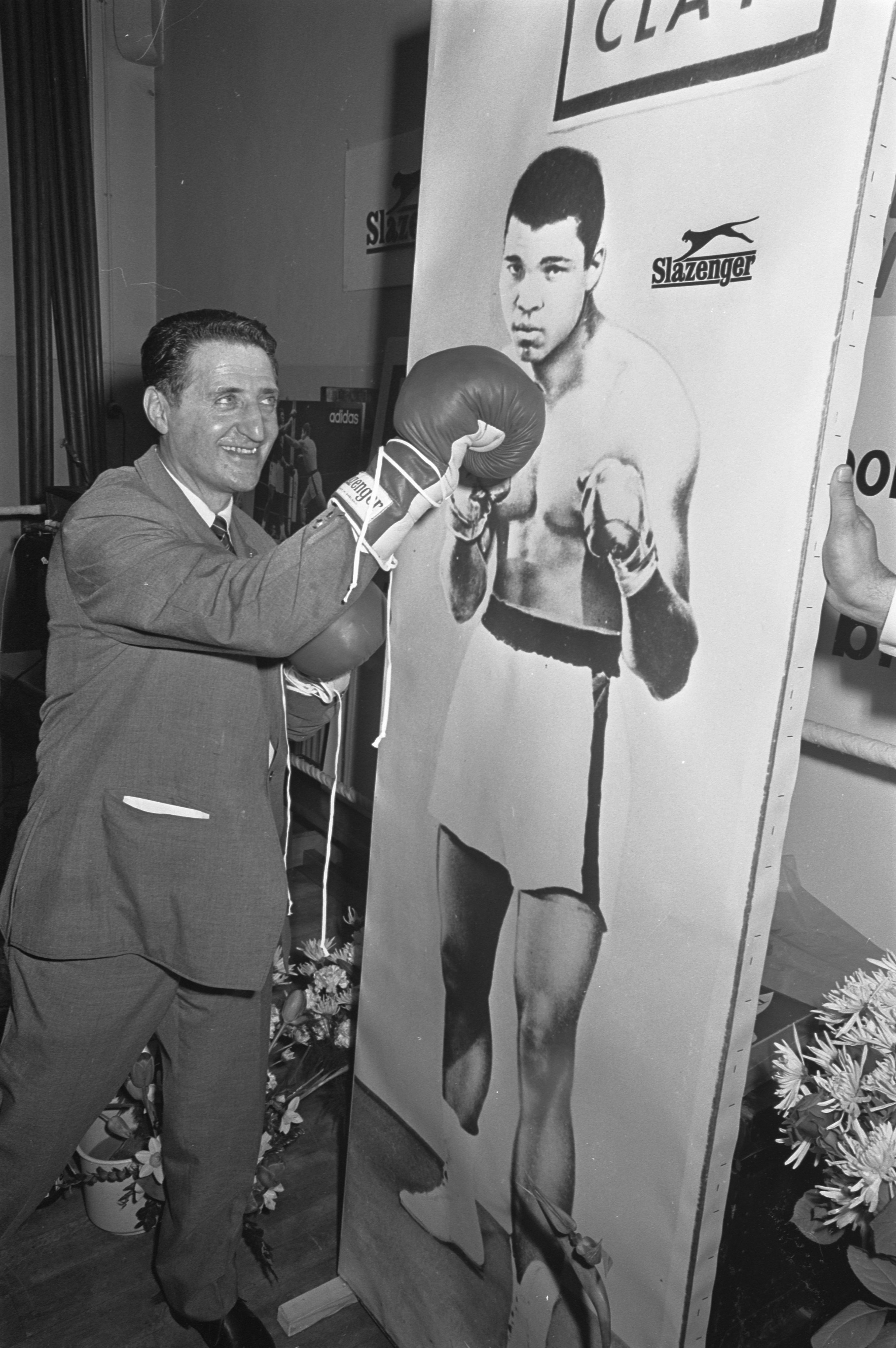 Collectie / Archief : Fotocollectie Anefo Reportage / Serie : [ onbekend ] Beschrijving : Opening Boksschool Straatman in Den Haag door Ben Bril (scheidsrechter) Datum : 18 april 1968 Locatie : Den Haag, Zuid-Holland Trefwoorden : Openingen, boksers, scheidsrechters, scholen Fotograaf : Kroon, Ron / Anefo Auteursrechthebbende : Nationaal Archief Materiaalsoort : Negatief (zwart/wit) Nummer archiefinventaris : bekijk toegang 2.24.01.05 Bestanddeelnummer : 921-2635